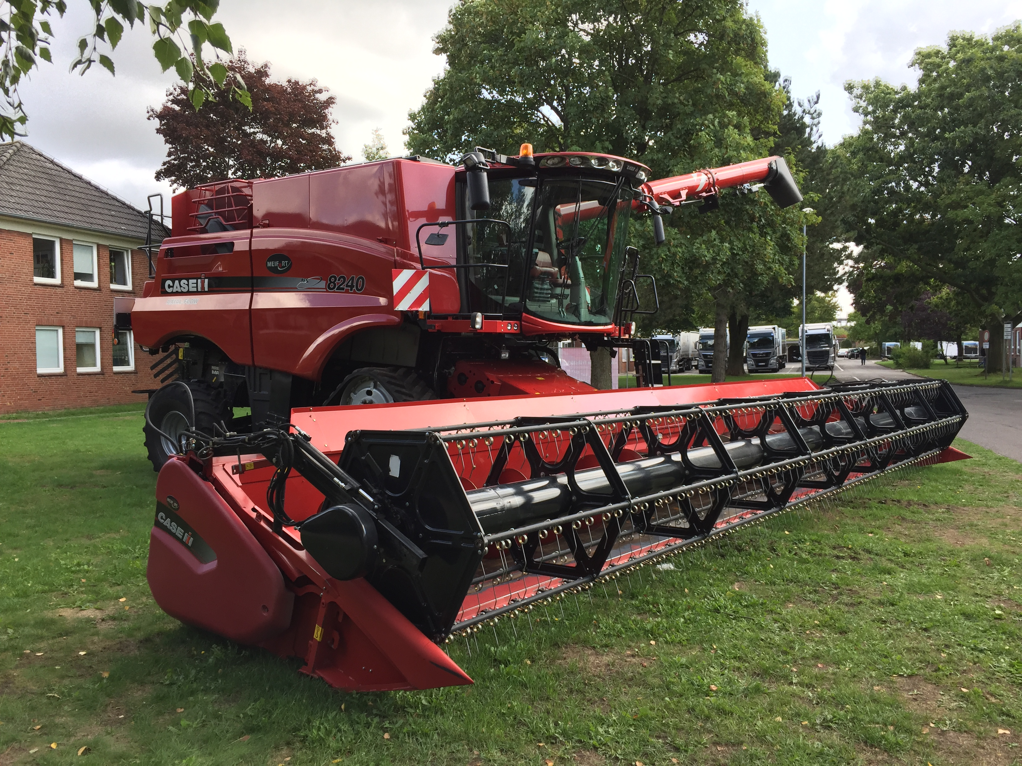 CASE IH Mähdrescher